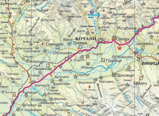 Kocani map